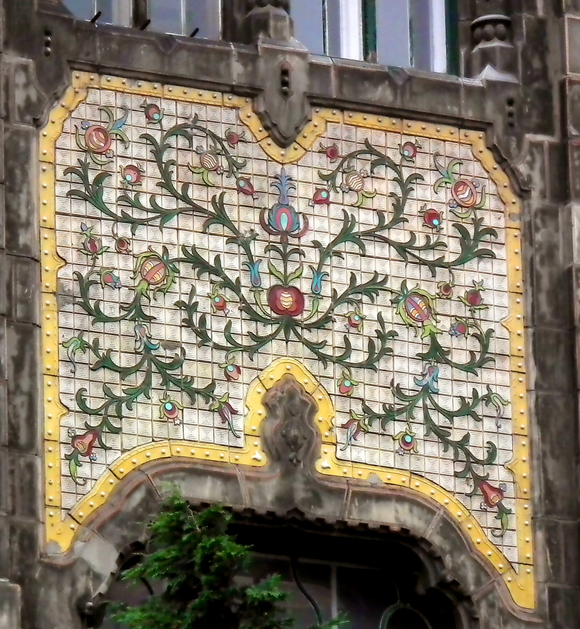 Az Iparművészeti Múzeum főhomlokzatán az I. és II. emeleti ablakokat összekötő kerámiadísz This is a photo of a monument in Hungary. Identifier: 1070